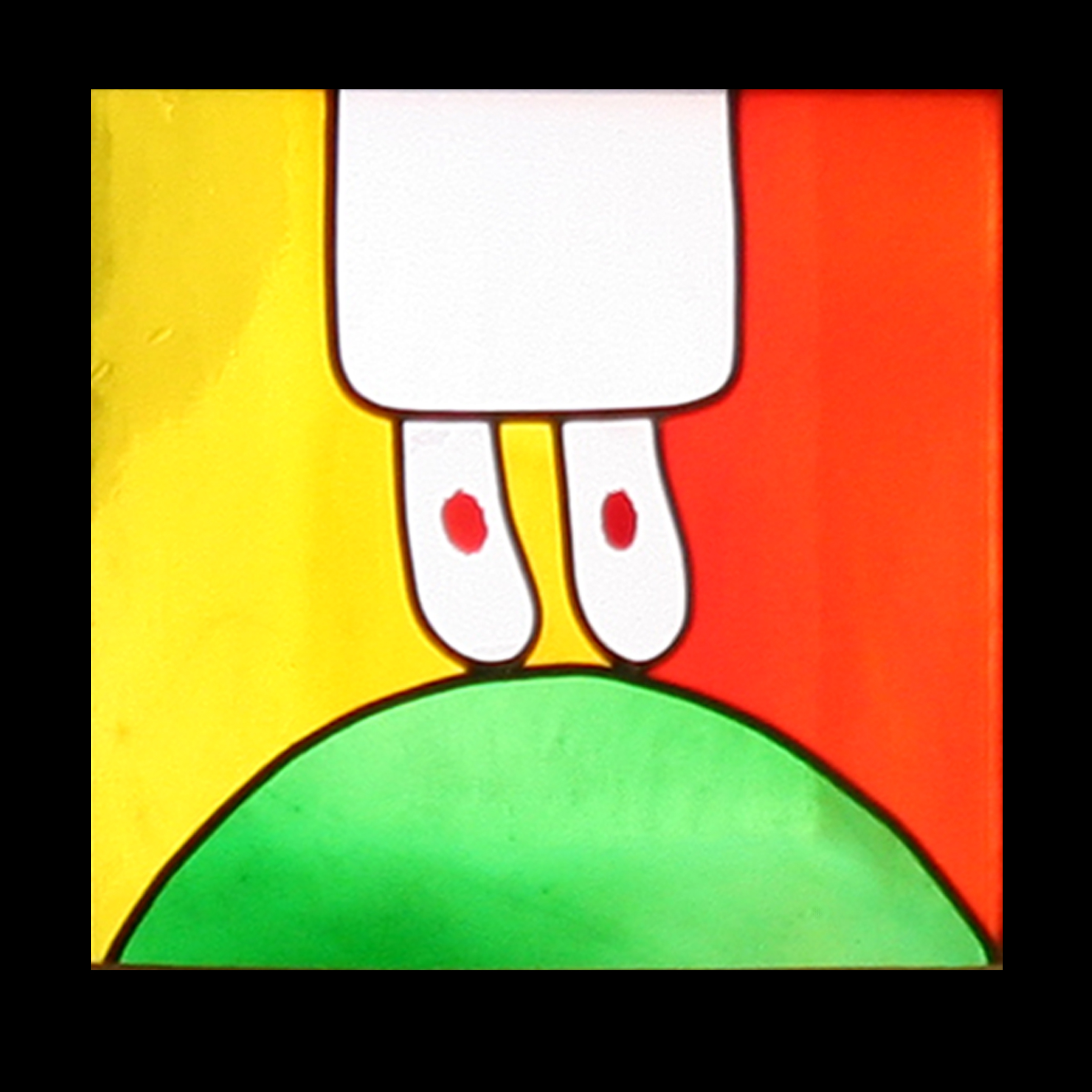 Kloster Ilanz, Klosterkirche, Glasfenster von Max Rüedi